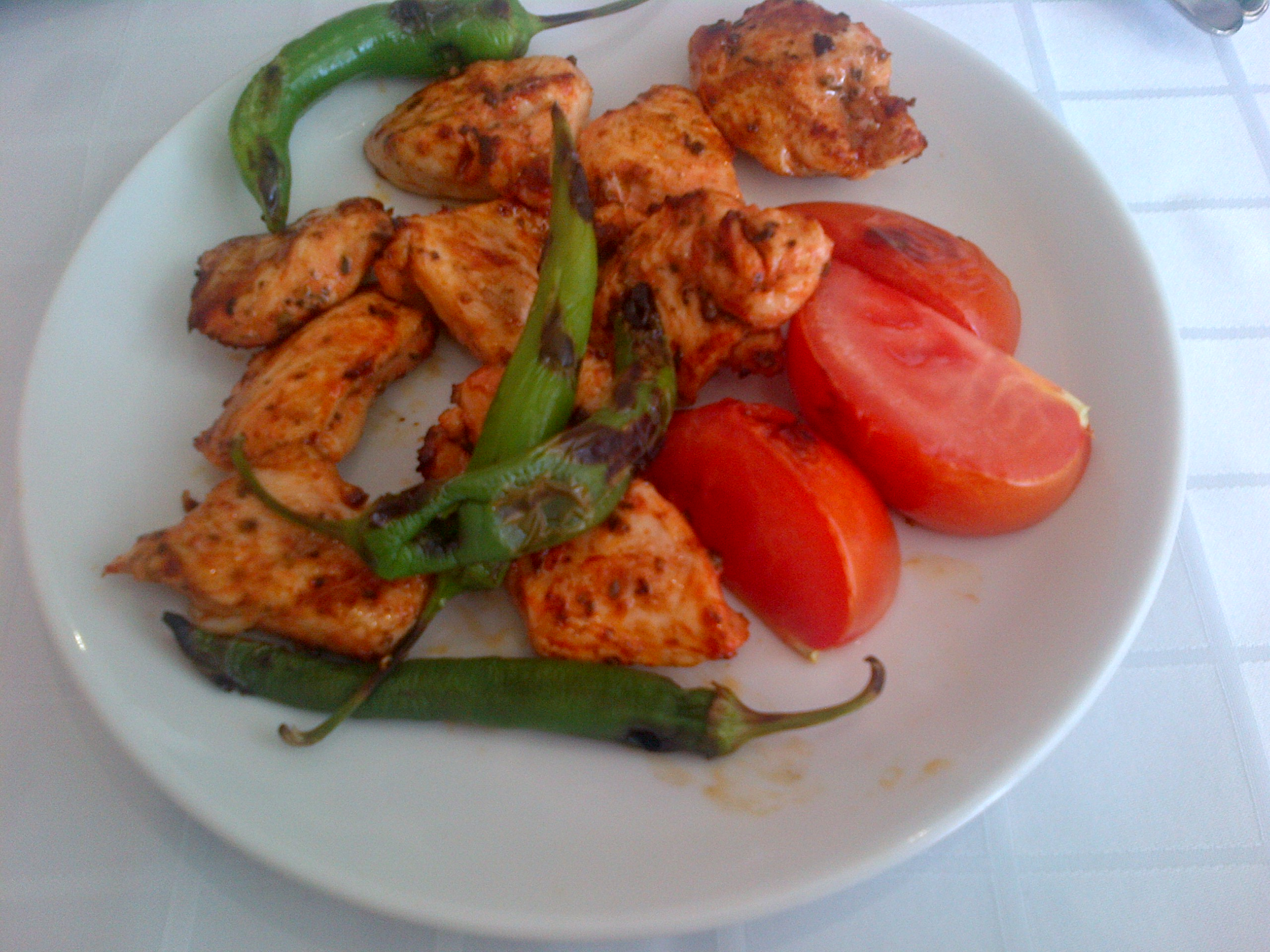 Tavuk şiş, o brochetas de pollo, de la cocina turca.